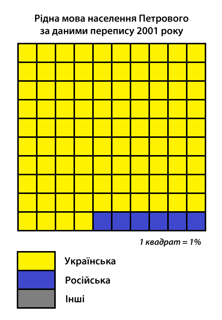 Інфографіка розподілу населення смт Петрове за рідною мовою згідно з даними перепису 2001 року. Джерело: Розподіл населення Кіровоградської області за рідною мовою (у % до загальної чисельності населення) за переписом 2001 року